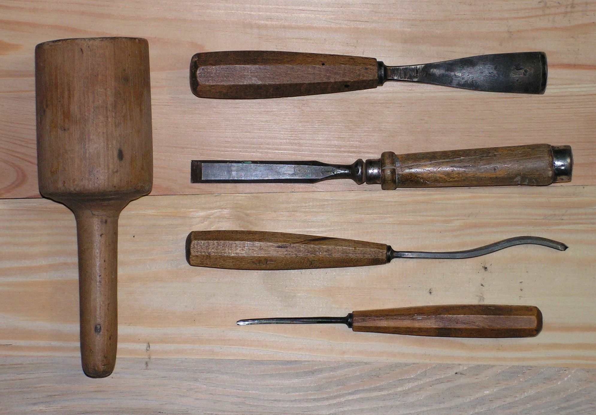 Zdjęcie przedstawia zestaw narzędzi snycerskich (dłuta, pobijak)